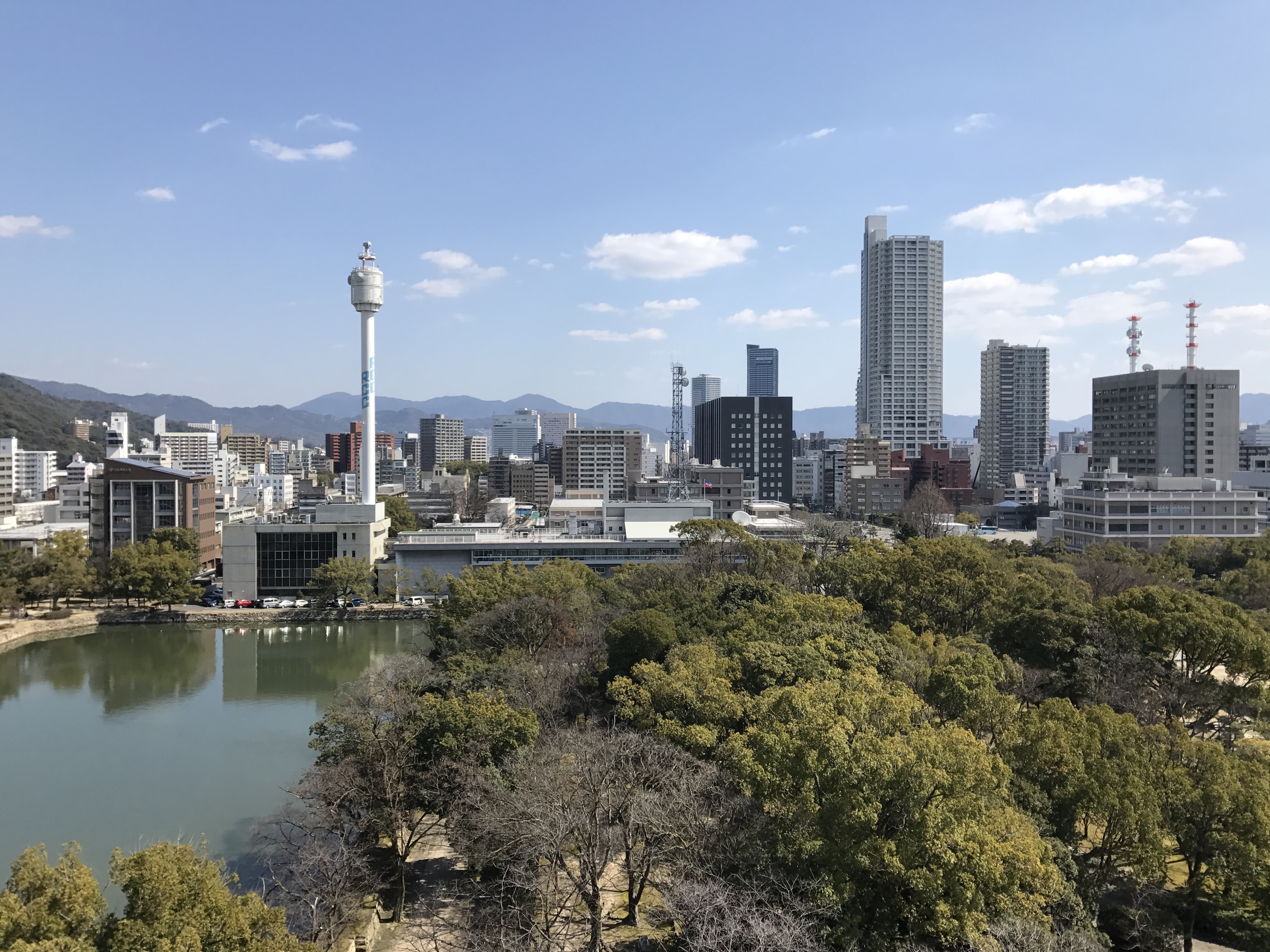 広島城の天守閣より望む広島駅方面